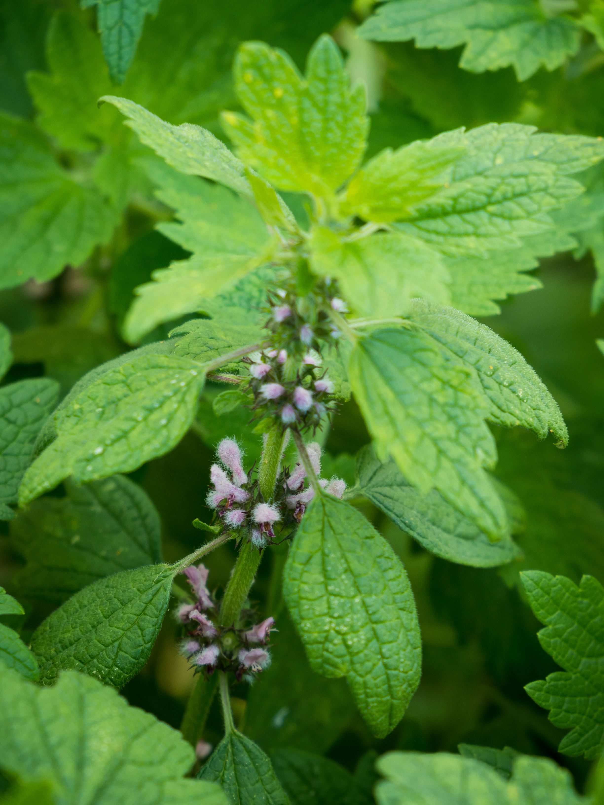 Herzgespann, lat. Leonurus cardiaca